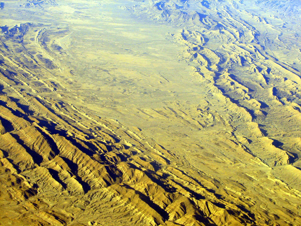 Makran range